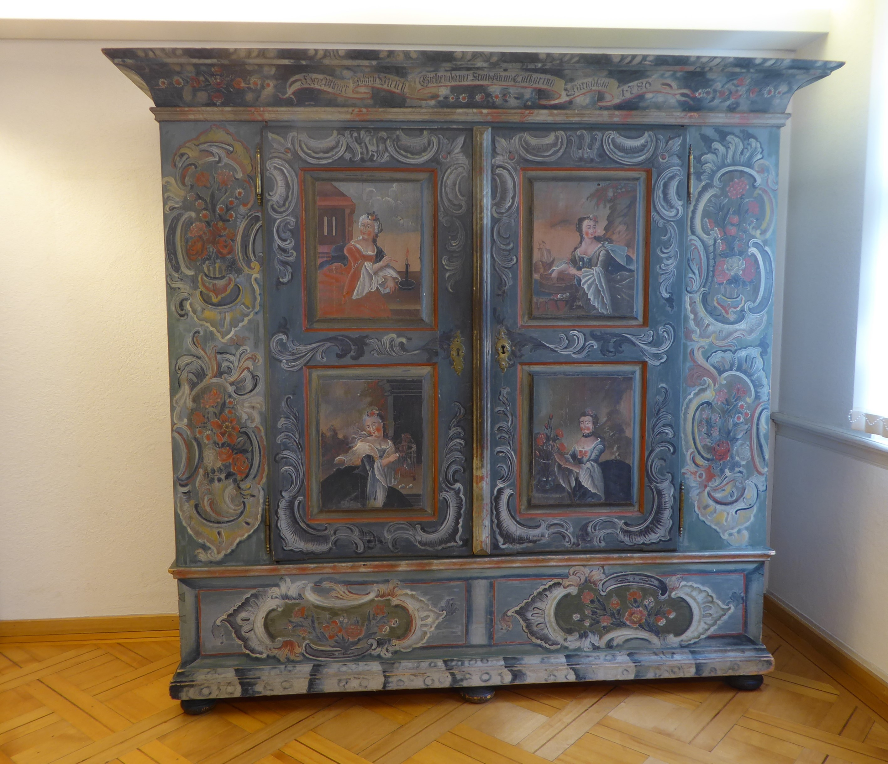 Schrank im Toggenburger Museum. Lichtensteig, 1780